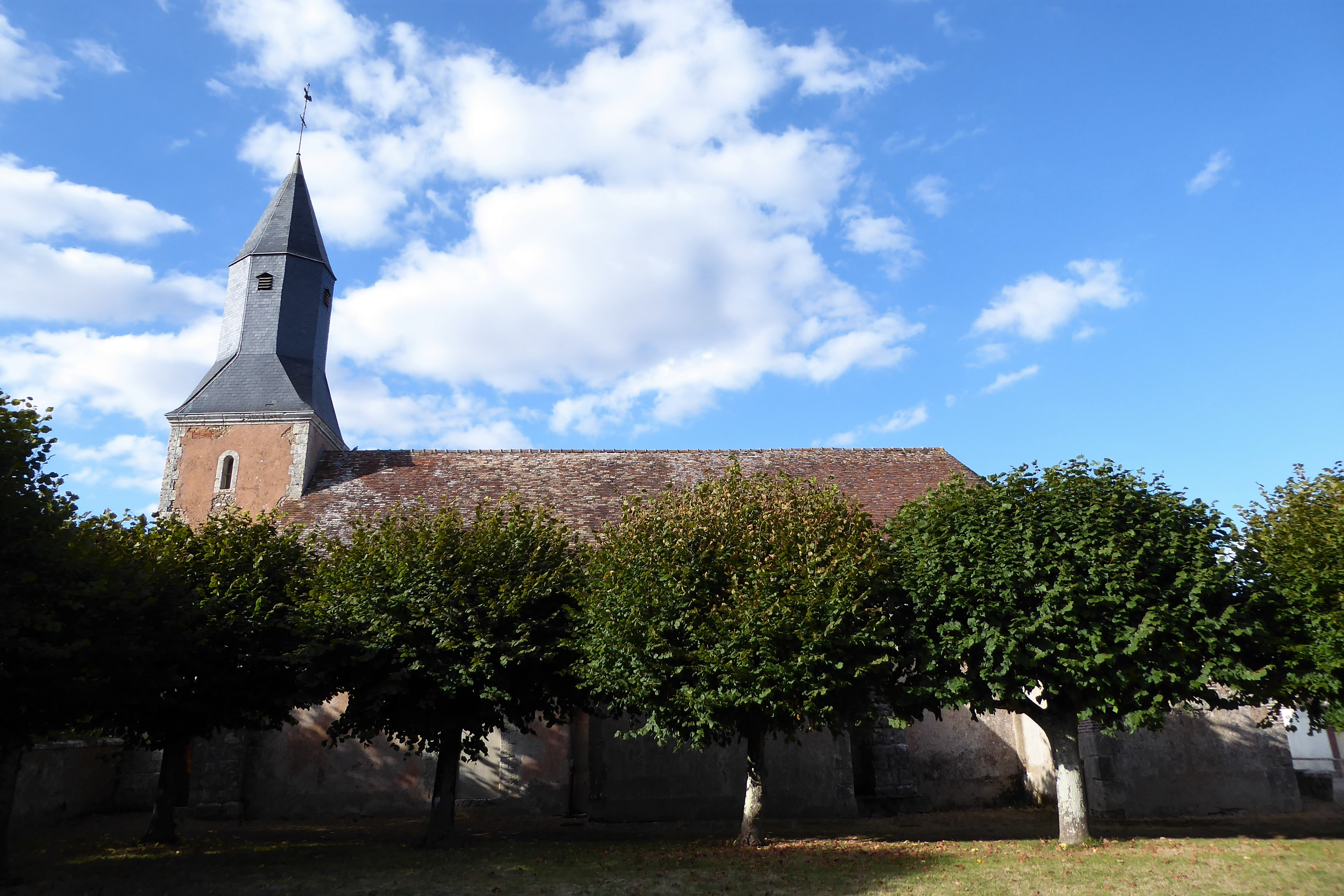 église Saint-Sylvain de Nogent-sur-Eure, Eure-et-Loir, France.